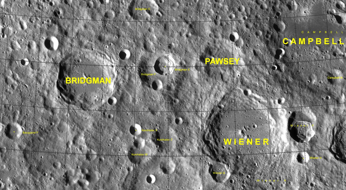 Cráter lunar Pawsey. Localización. (Imagen LRO)